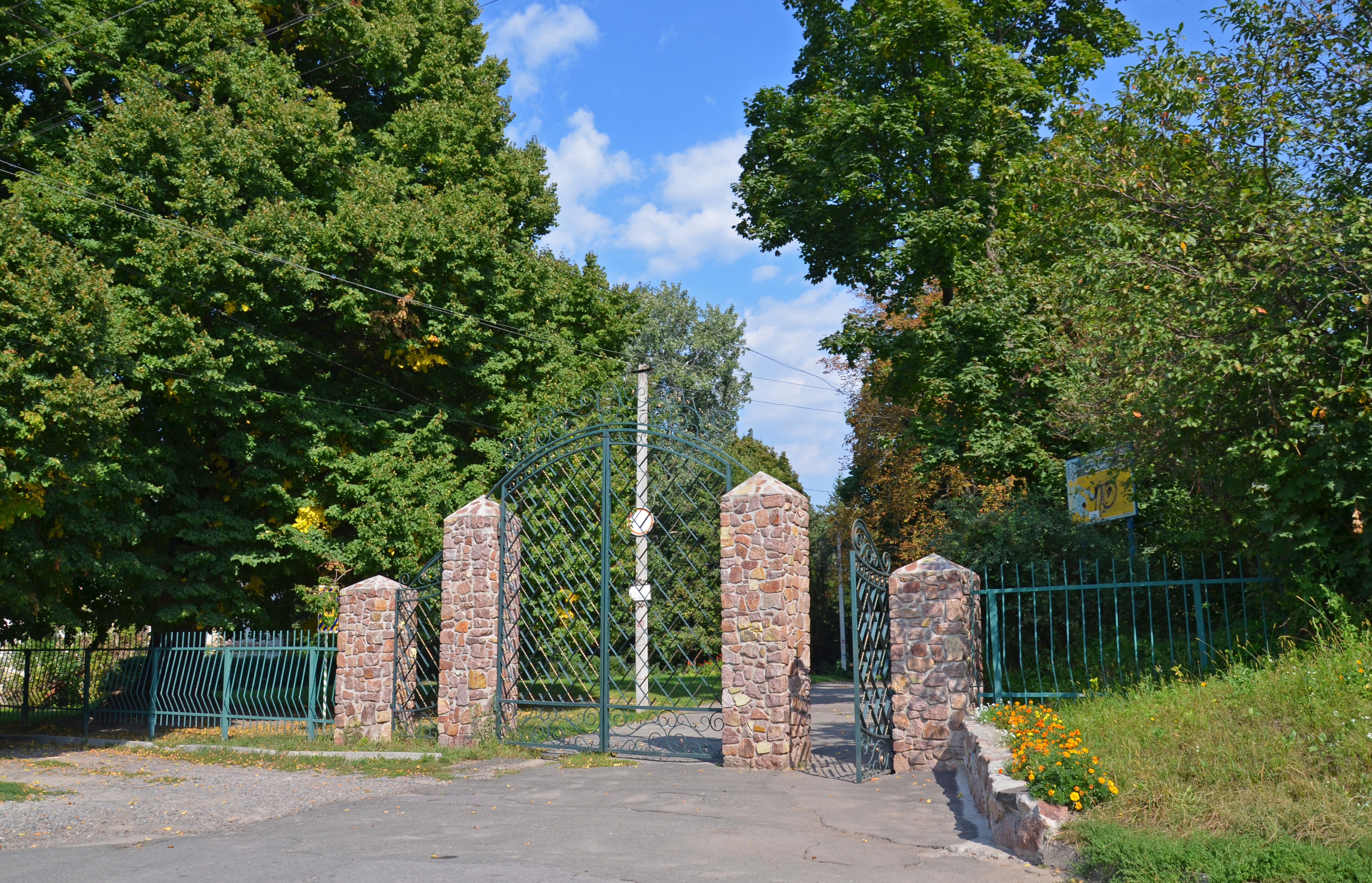 «Молодіжний» парк-пам'ятка садово-паркового мистецтва (14,78 га), Фастів